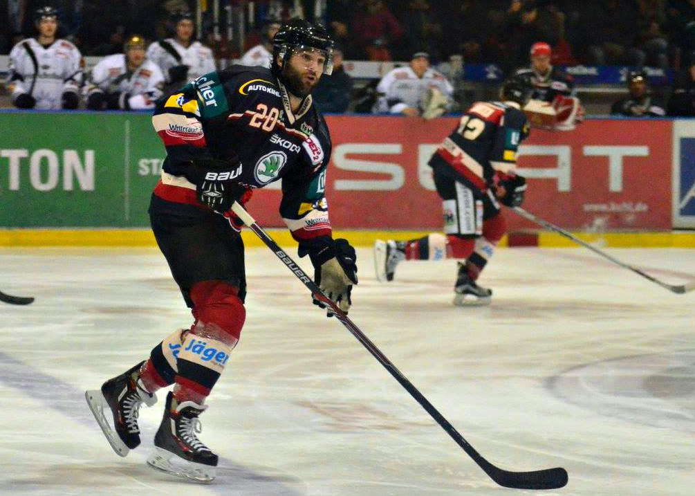 Dustin Cameron